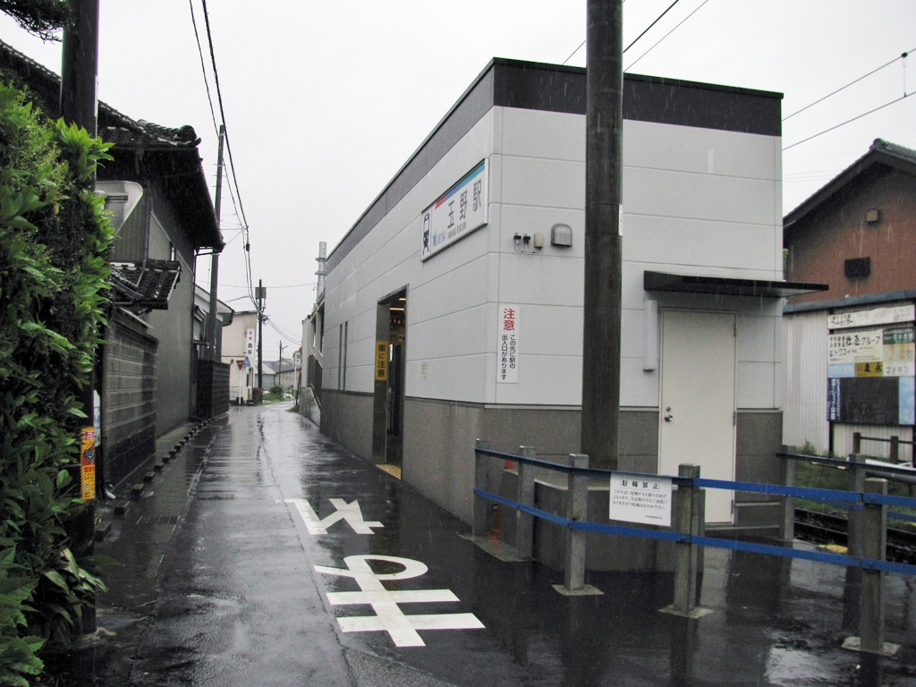 名鉄尾西線玉野駅